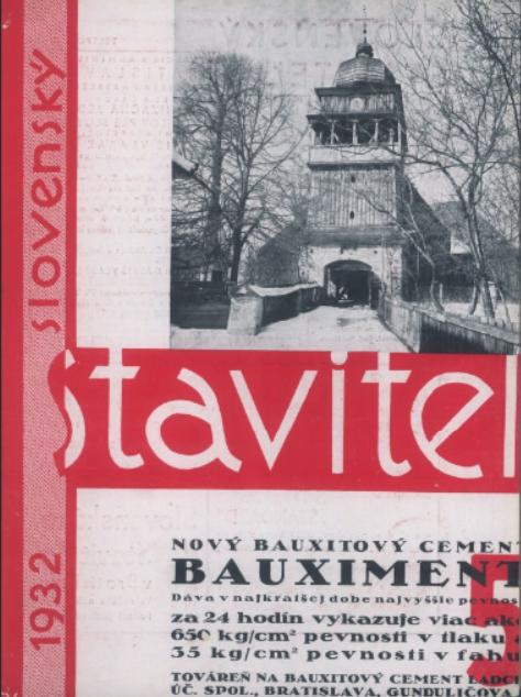 Titulný list mesačníka Slovenský staviteľ (s podnázvom Orgán Organizačnej jednoty staviteľov pre Slovensko), ktorý vychádzal na Slovensku od r. 1931 do 1942.